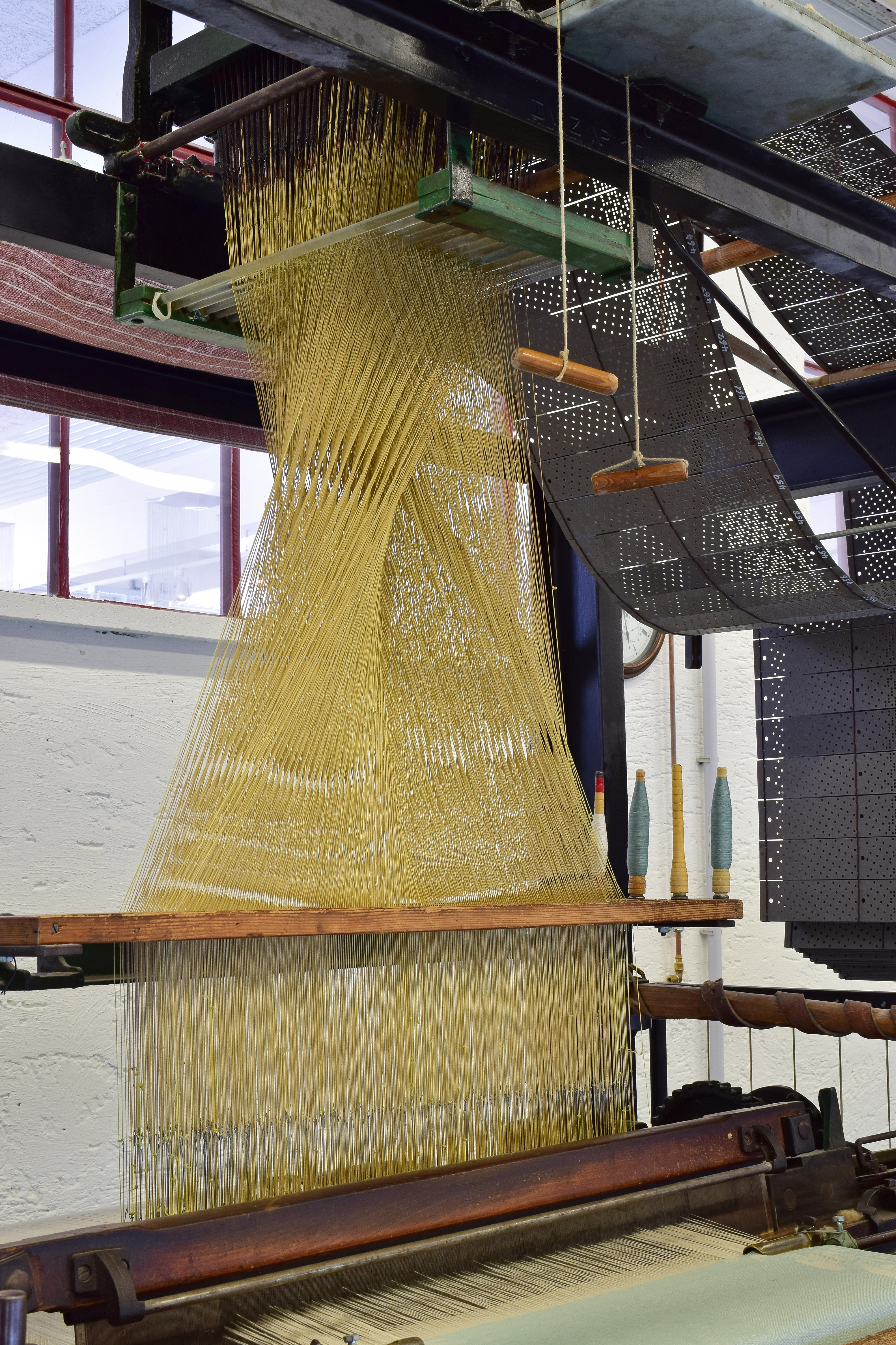 Die Aufnahme aus dem Textilen Zentrum in Haslach an der Mühl zeigt ein Detail einer Jacquardwebmaschine der Firma Hübner, Wien. Bei einer Jacquardwebmaschine kann jeder Kettfaden einzeln gehoben und gesenkt werden - dies geschieht über die hier sichtbaren Fäden, die über Lochkarten (rechts im Bild) gesteuert werden.